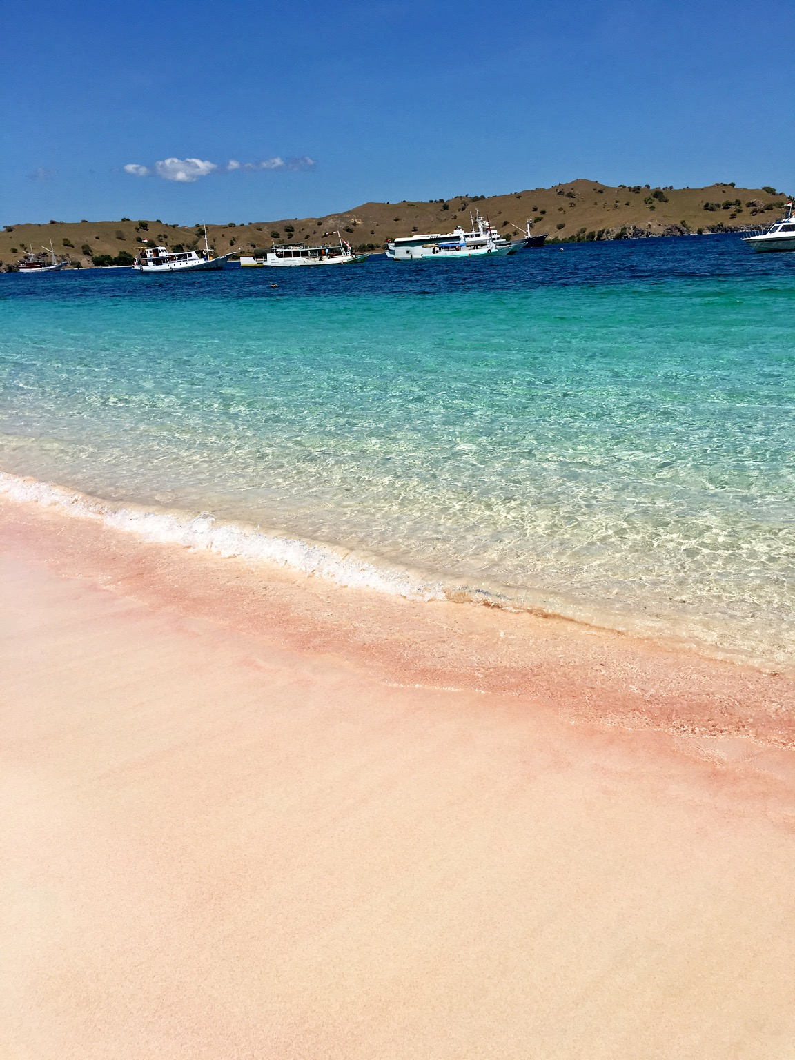 Pantai pink warna Pink